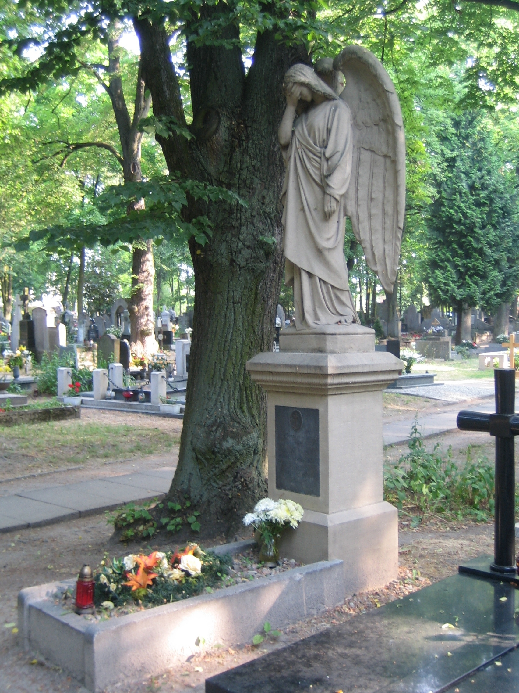 Nagrobek Antoniny Kolasińskej na cmentarzu na Jeżycach